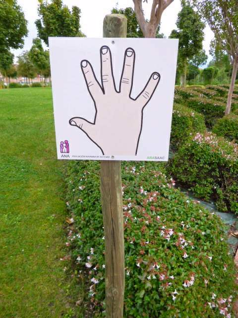 Parque de los Sentidos (Noáin, Navarra)